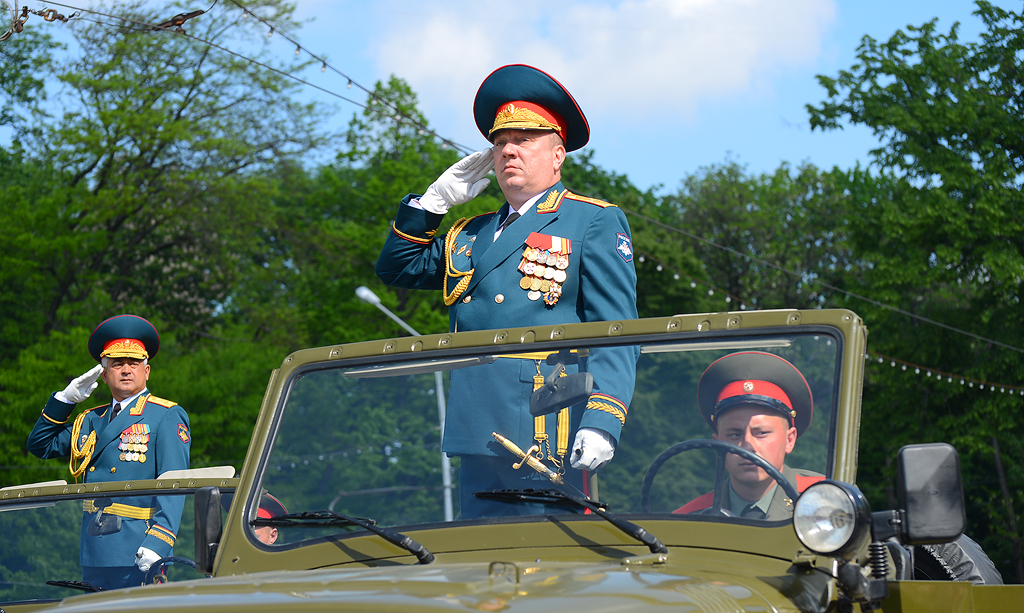 Парад победы 9 мая 2013 года во Владикавказе